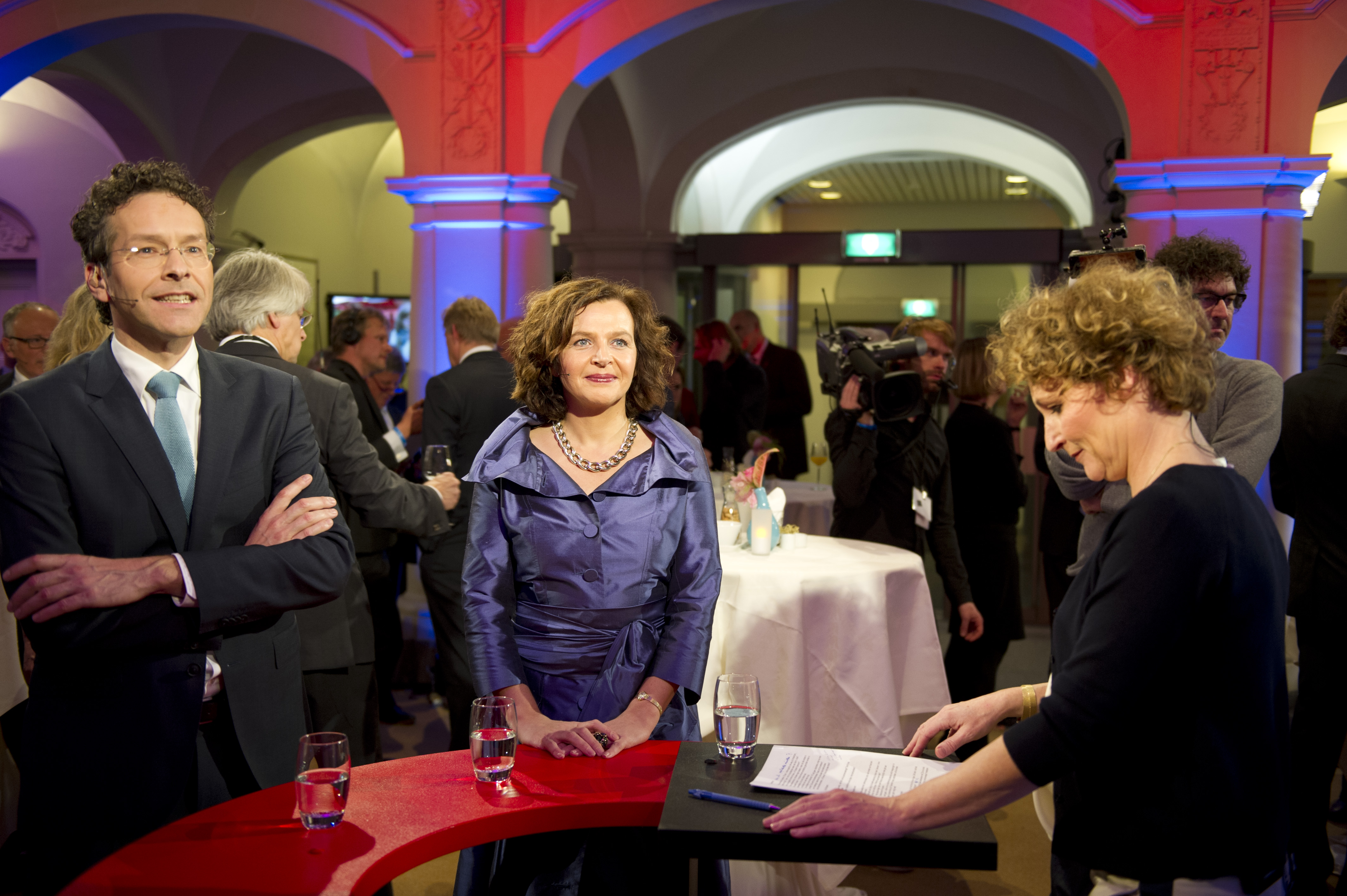 Ministers Dijsselbloem en Schippers, en politiek verslaggever Van der Heyde in de laatste minuten voor het live-interview.